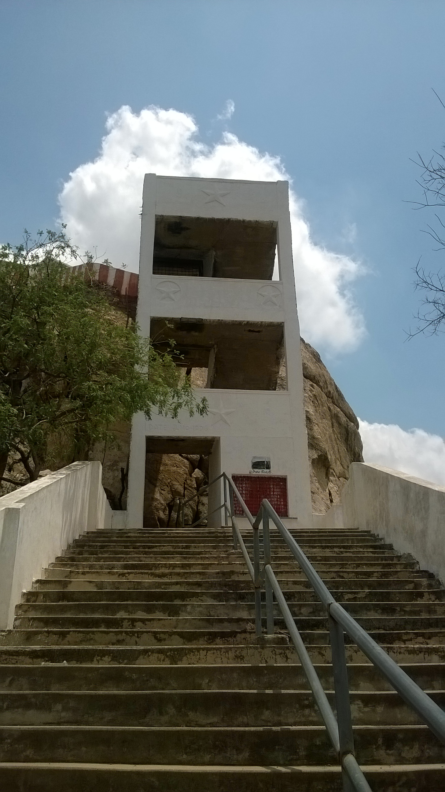 గుడికి మెట్లదారి